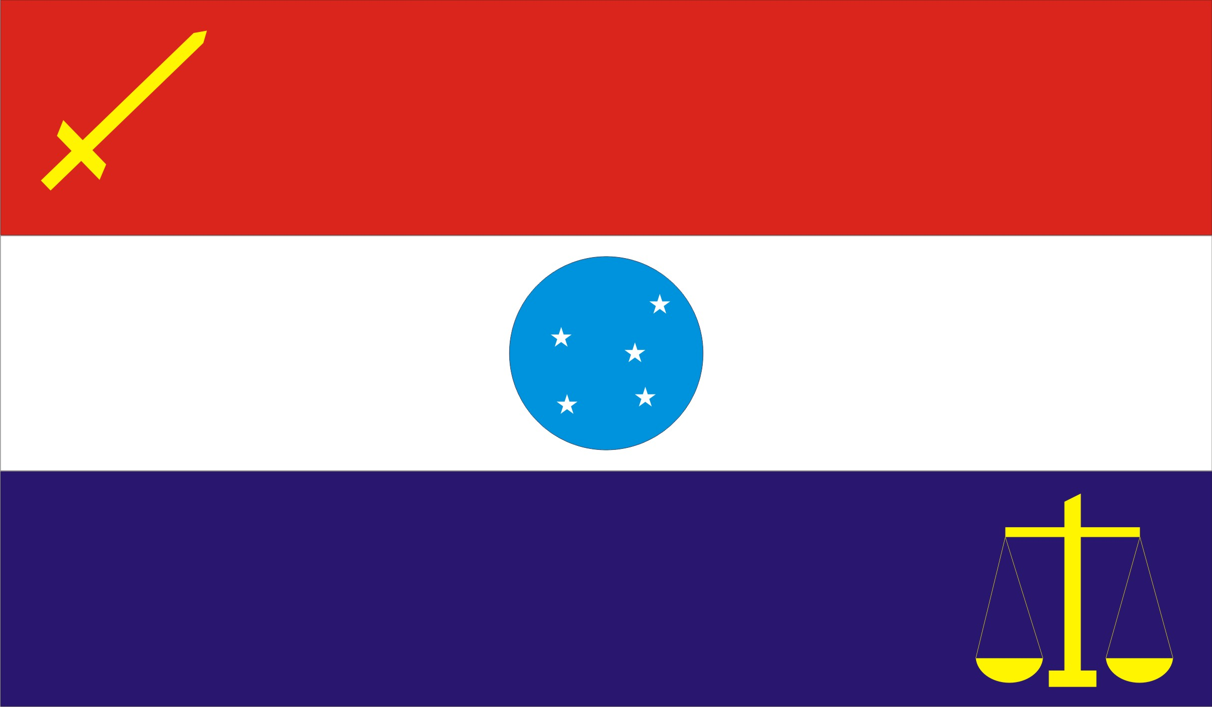 Bandeira do município de Sairé